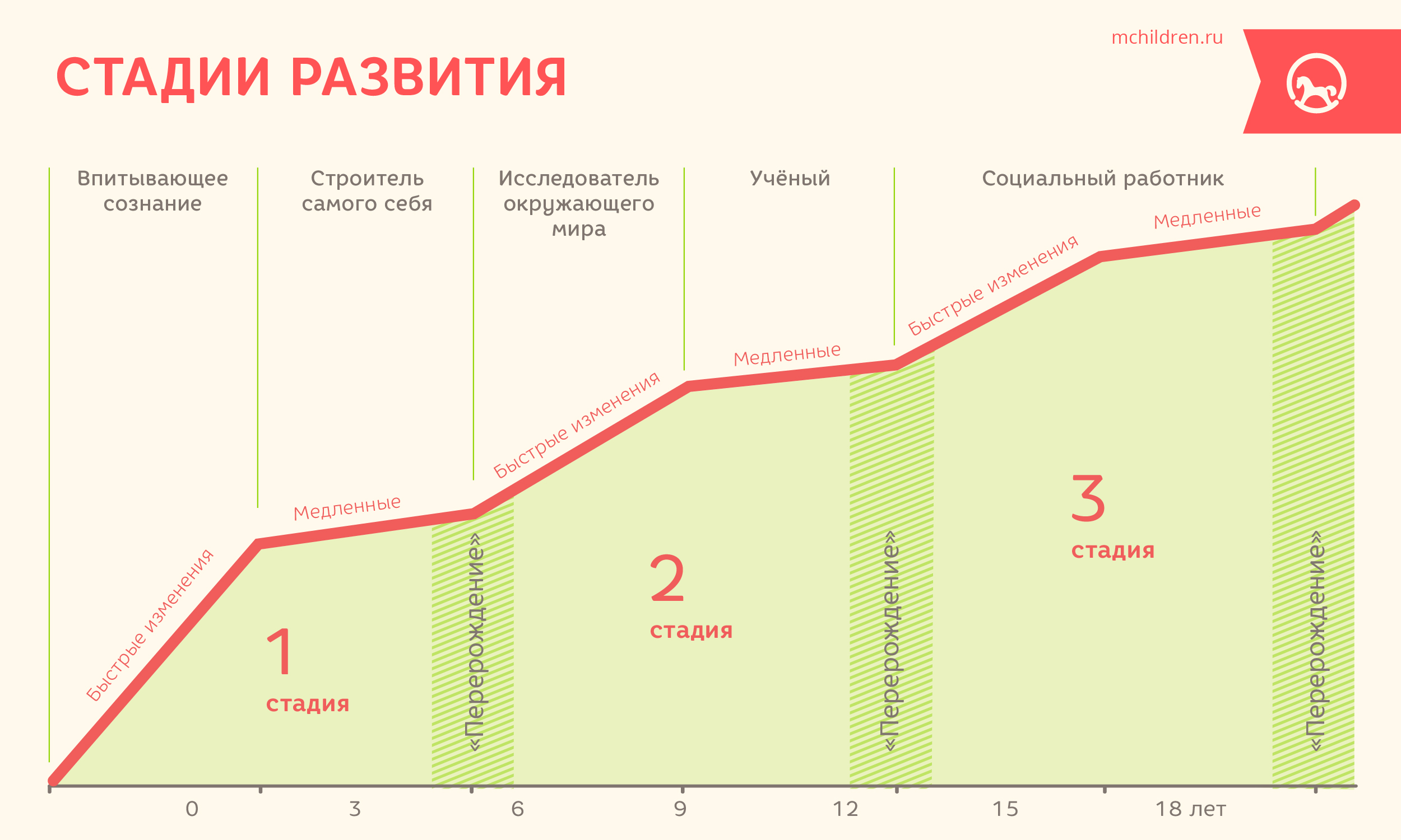 Стадии развития ребенка: иллюстрация по материалам книги Марии Монтессори "Дети другие"